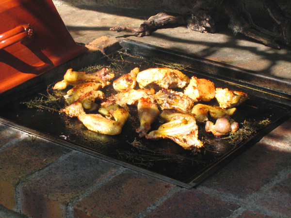 Cuisiner une Andalouse de poulet a la plancha (2) sur un ancien barbecue.